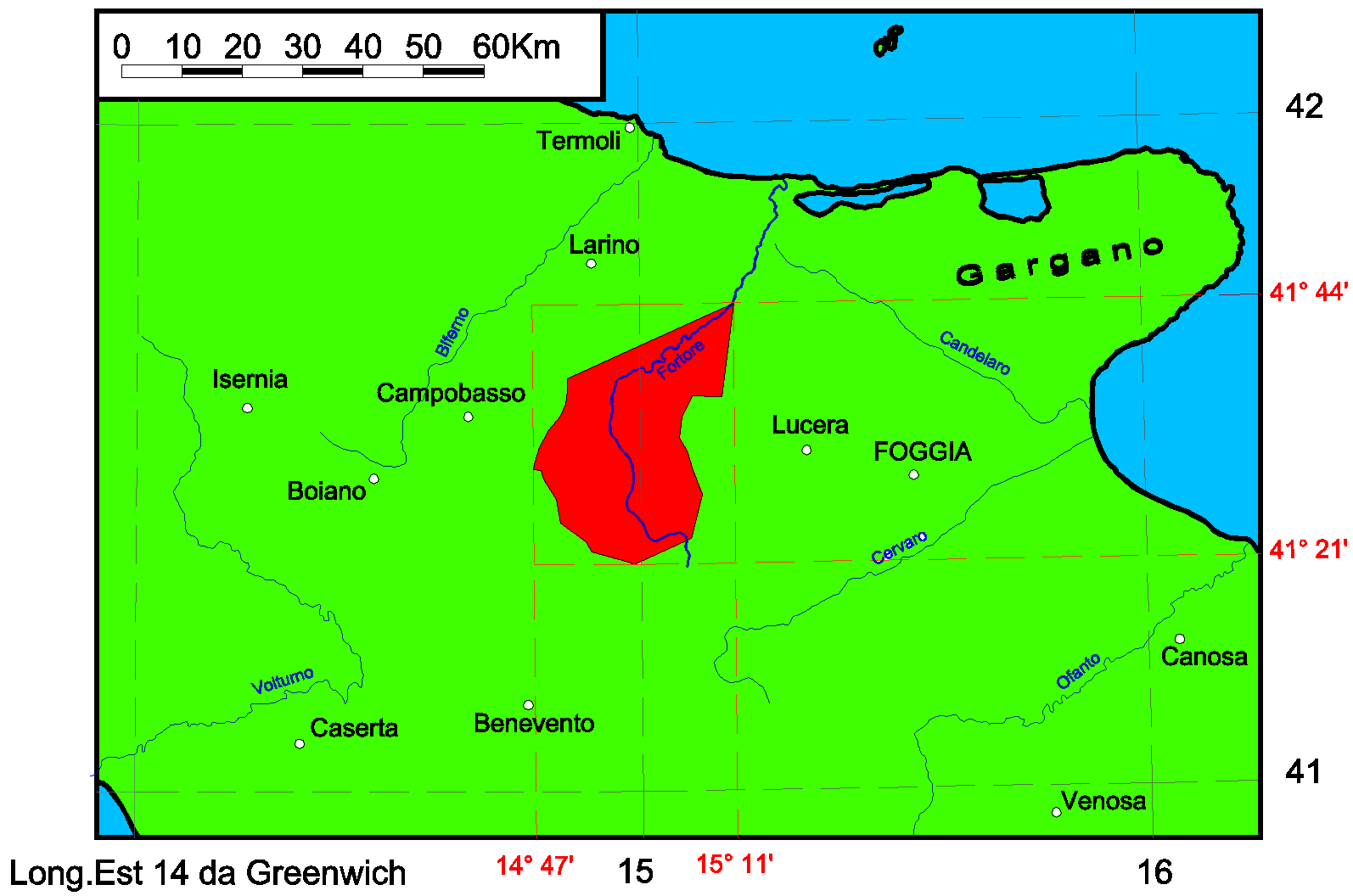 La zona comune della battaglia di Canne individuata dalle fonti antiche